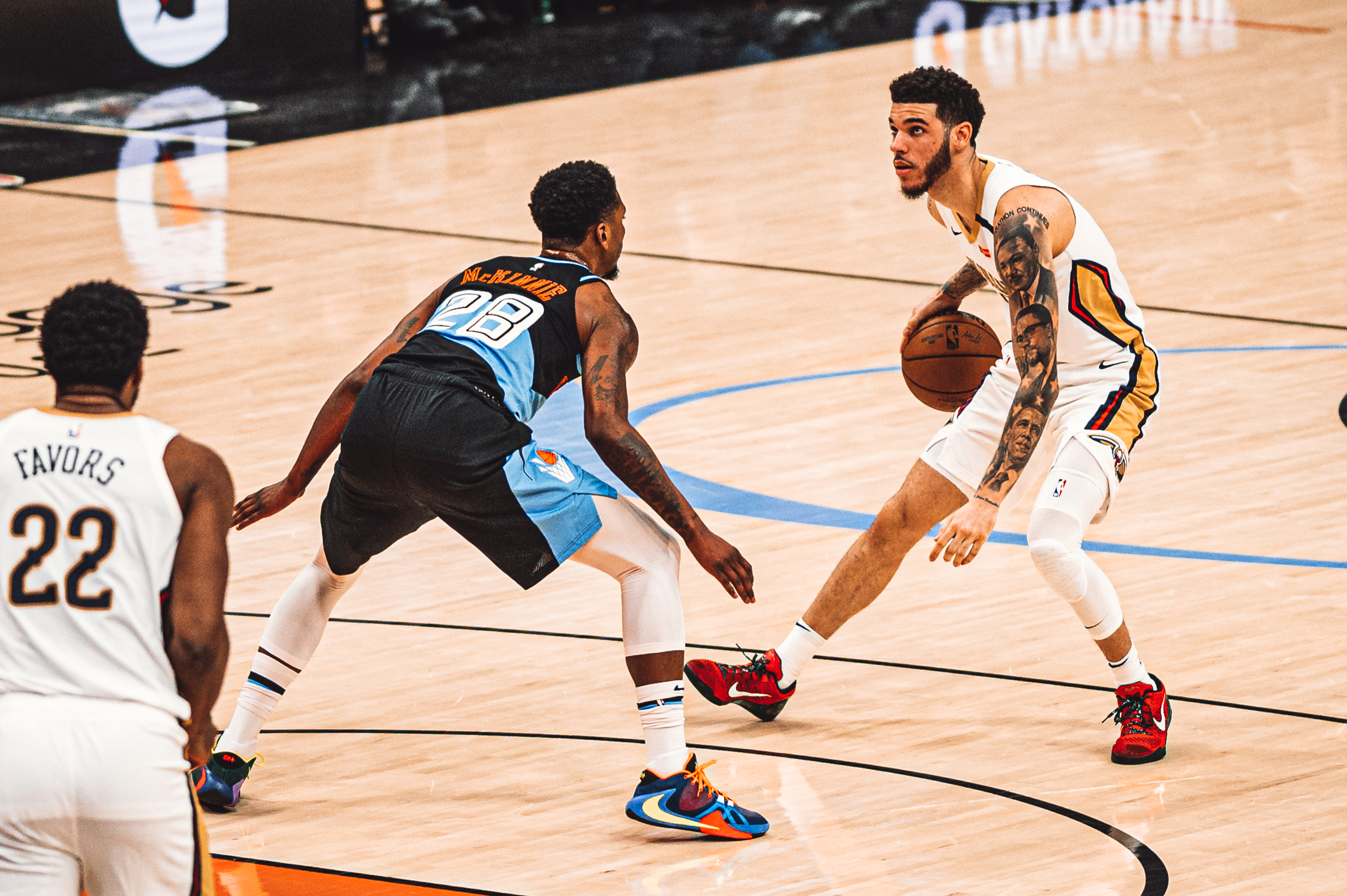 Lonzo Ball